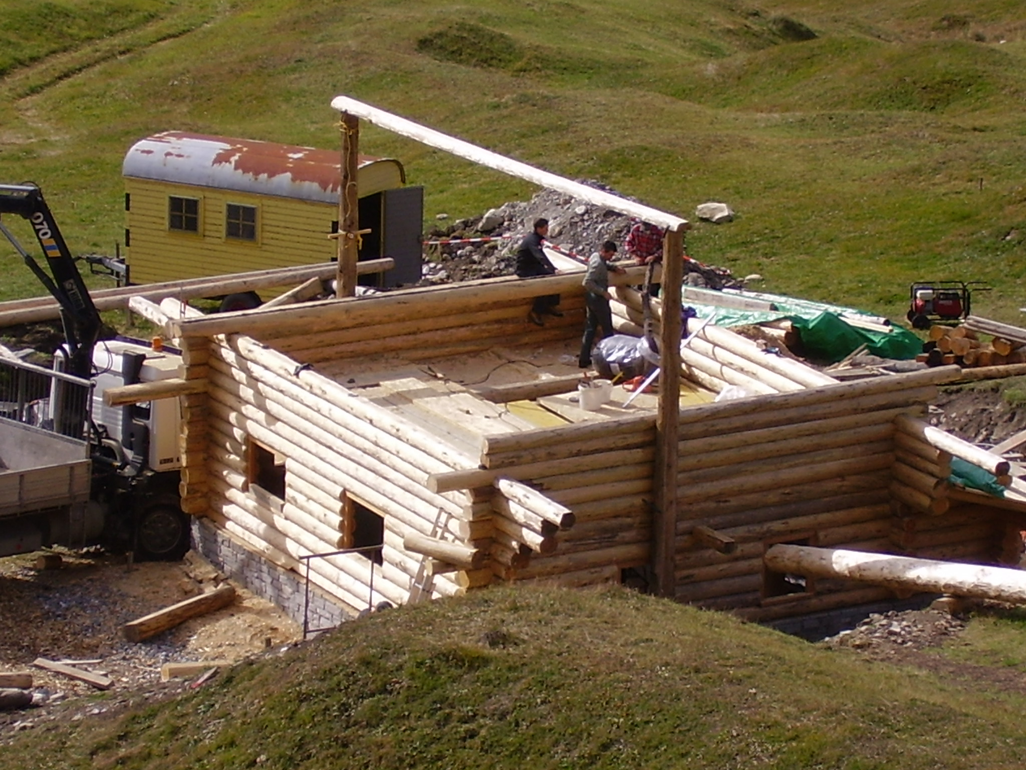 Eine Blockhütte im Bau; fotografiert im Val Sinestra bei Sent GR, Schweiz.